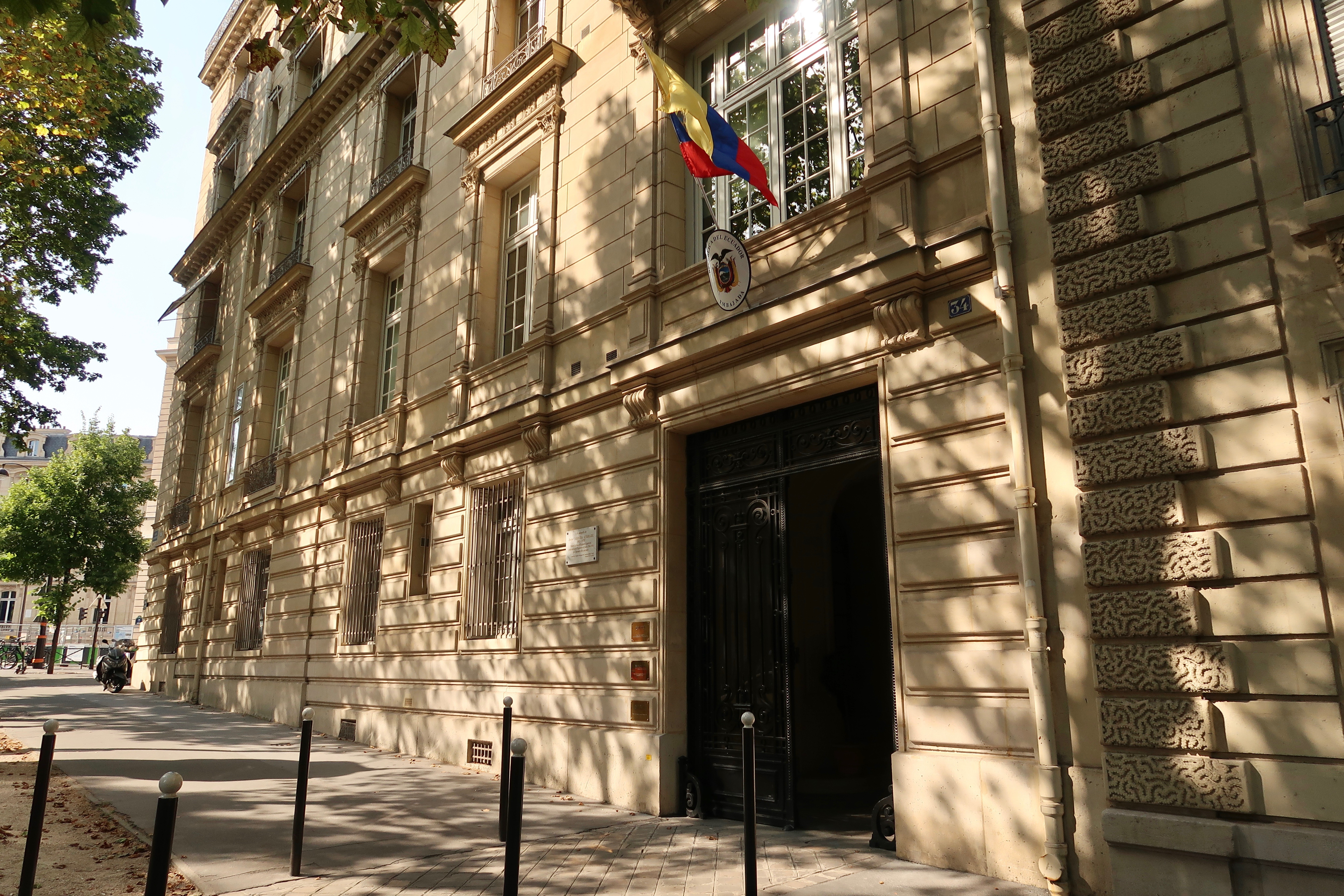 Ambassade d'Équateur en France, 34 avenue de Messine (Paris, 8e).